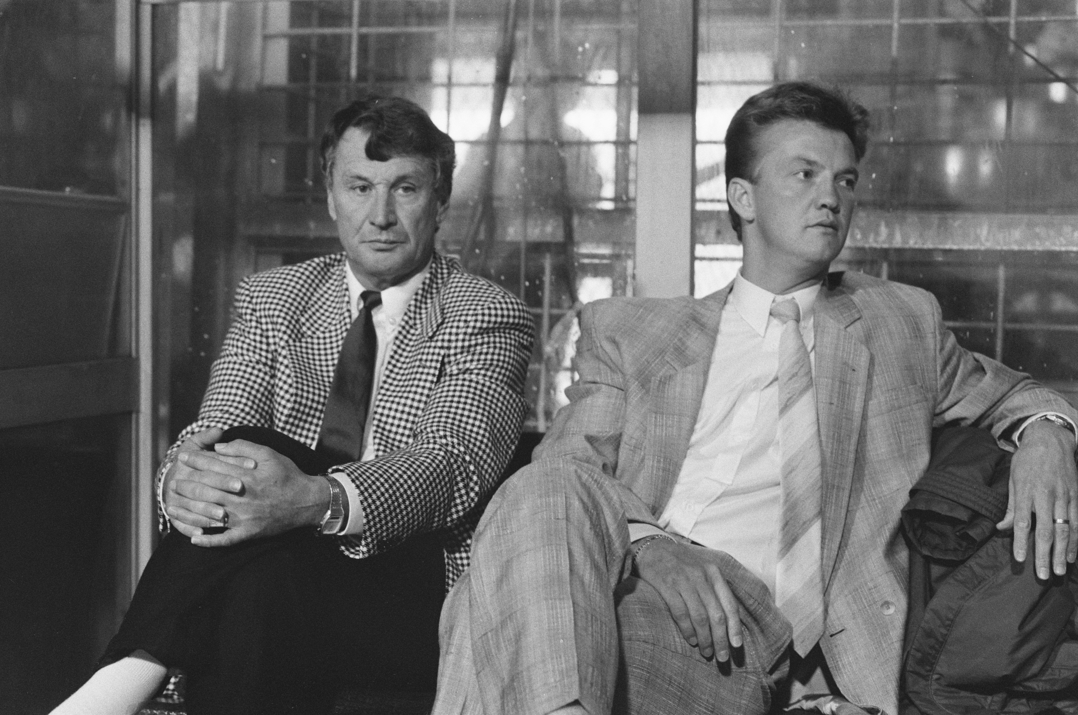 Collectie / Archief : Fotocollectie Anefo Reportage / Serie : [ onbekend ] Beschrijving : UEFA Cup Ajax tegen Sporting Lissabon 1-2; Ajaxtrainer Spitz Kohn en Louis van Gaal Datum : 5 oktober 1988 Trefwoorden : sport, voetbal Persoonsnaam : Gaal, Louis van, Kohn, Spitz Instellingsnaam : UEFA Cup Fotograaf : Croes, Rob C. / Anefo Auteursrechthebbende : Nationaal Archief Materiaalsoort : Negatief (zwart/wit) Nummer archiefinventaris : bekijk toegang 2.24.01.05 Bestanddeelnummer : 934-3327